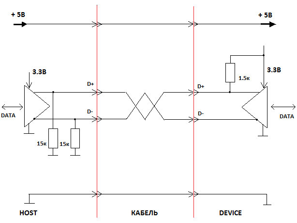 Упрощенная электрическая схема портов USB Full Speed.